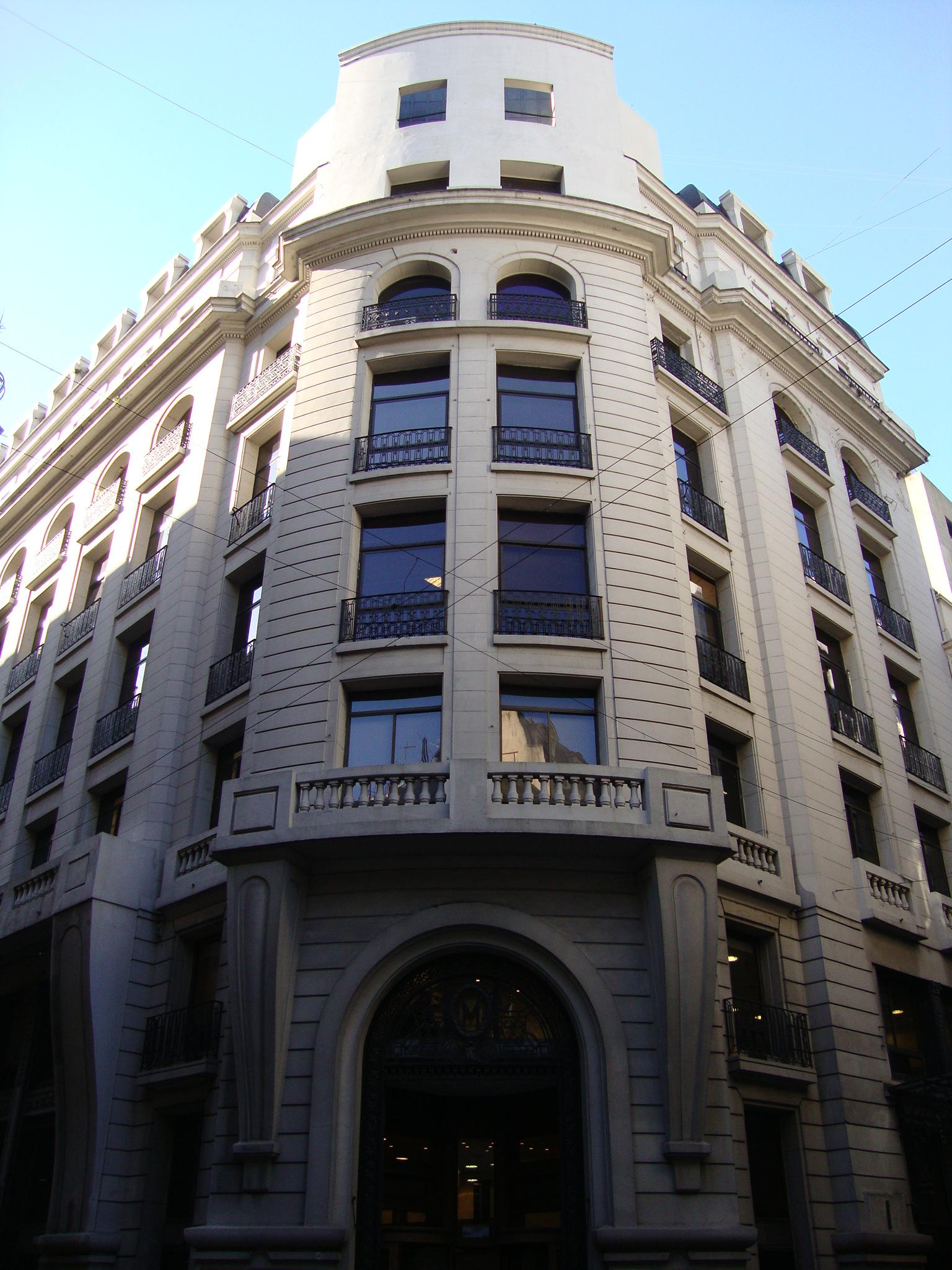 Edificio de la Compañía de Navegación Nicolás Mihanovich, en Teniente Gral. Juan D. Perón 300 (esquina 25 de Mayo). Remodelado posteriormente, como se puede ver en los últimos pisos. Actual propiedad del Correo Argentino. Buenos Aires, Argentina.